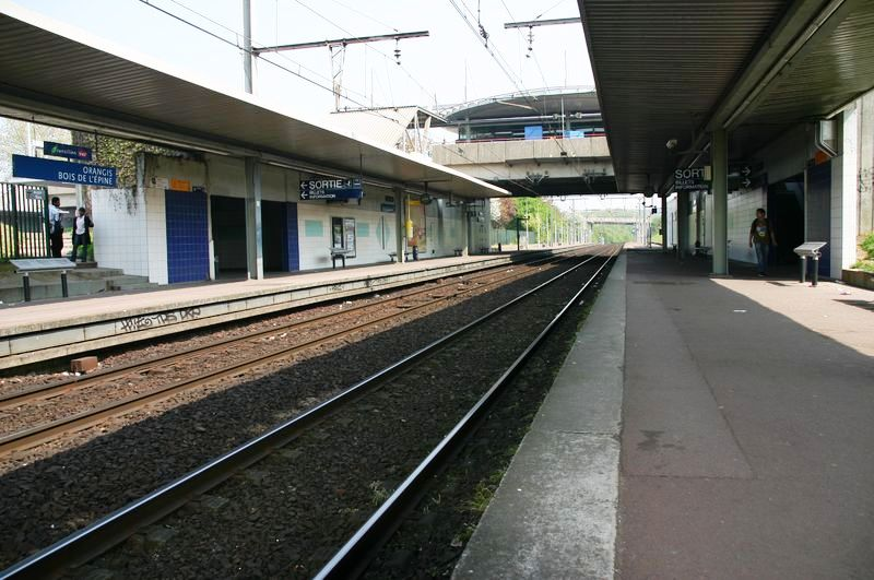 Gare d'Orangis-Bois-de-L'Epine.